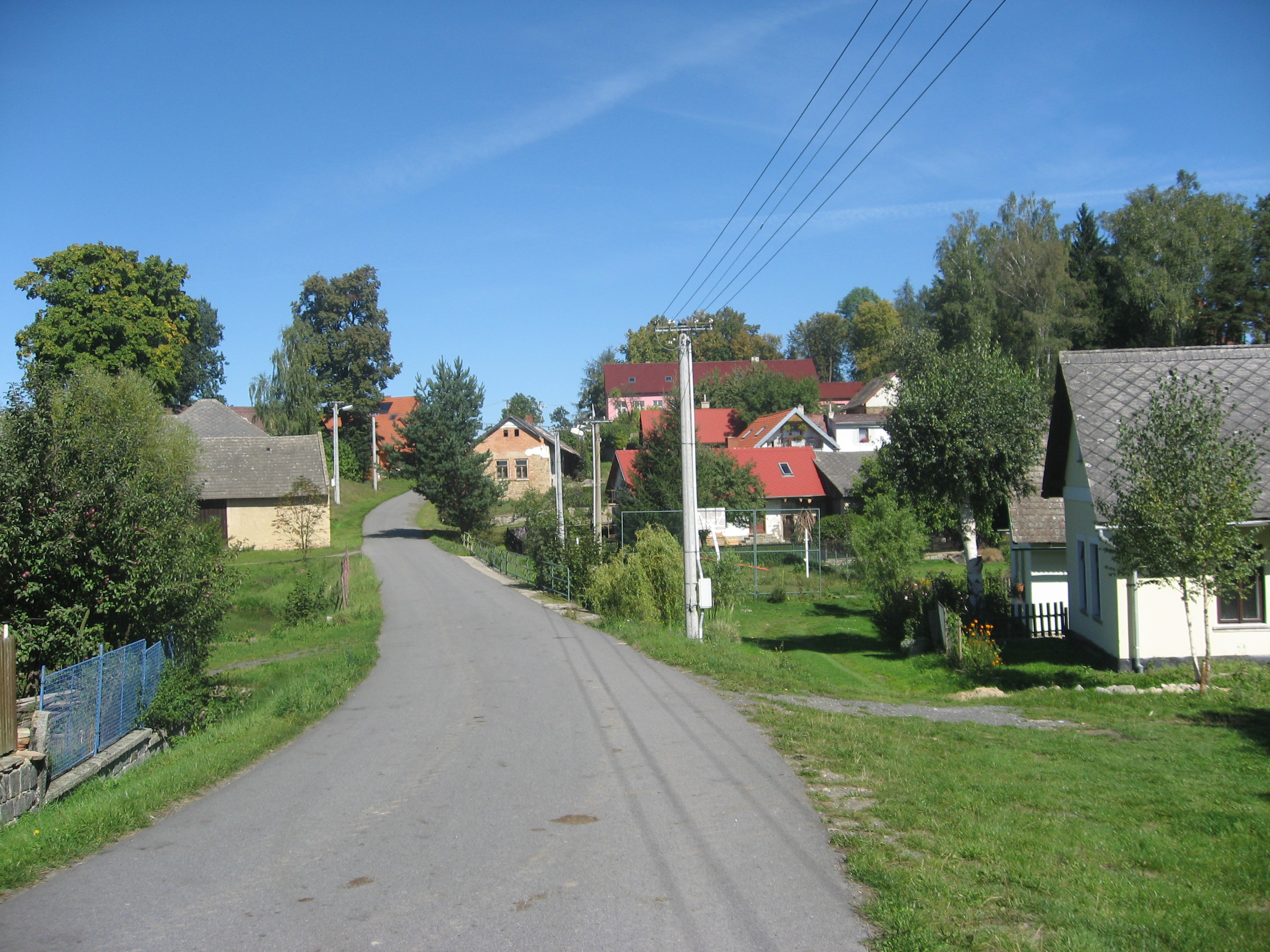 Řečice